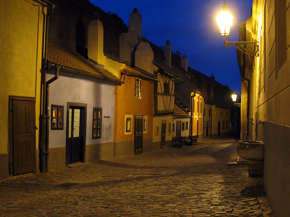 The Golden Lane(Zlatá Ulička)